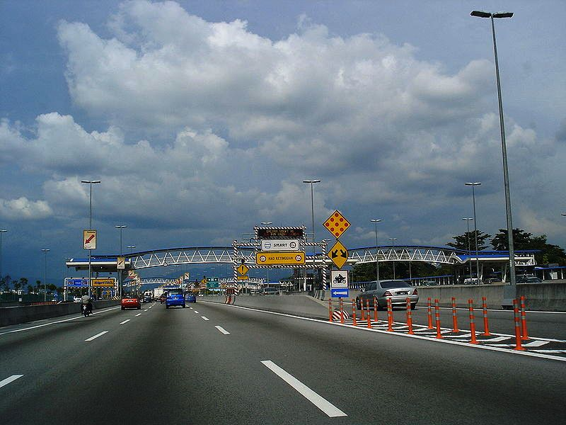 A SMART alagút bejárata